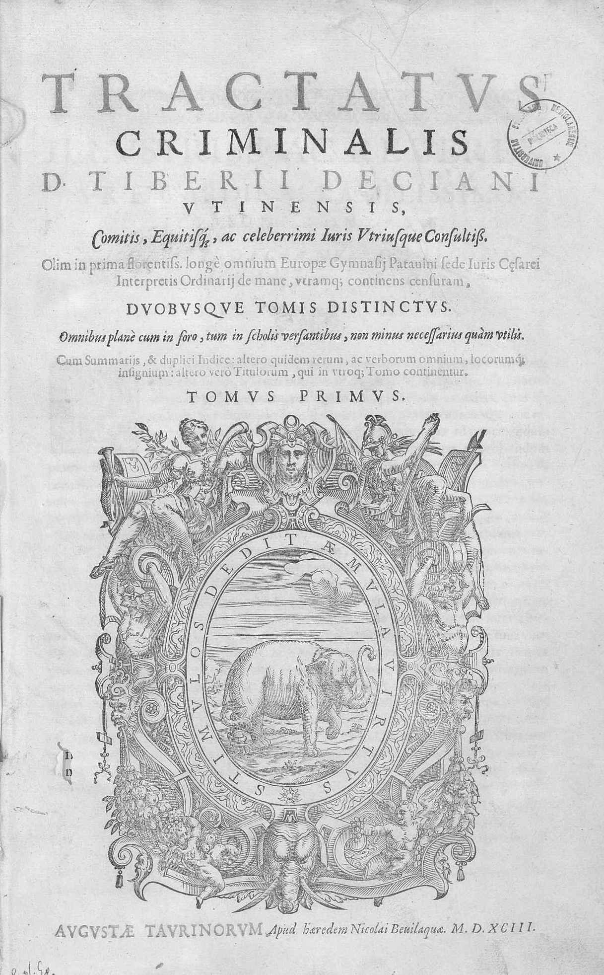 Frontespizio